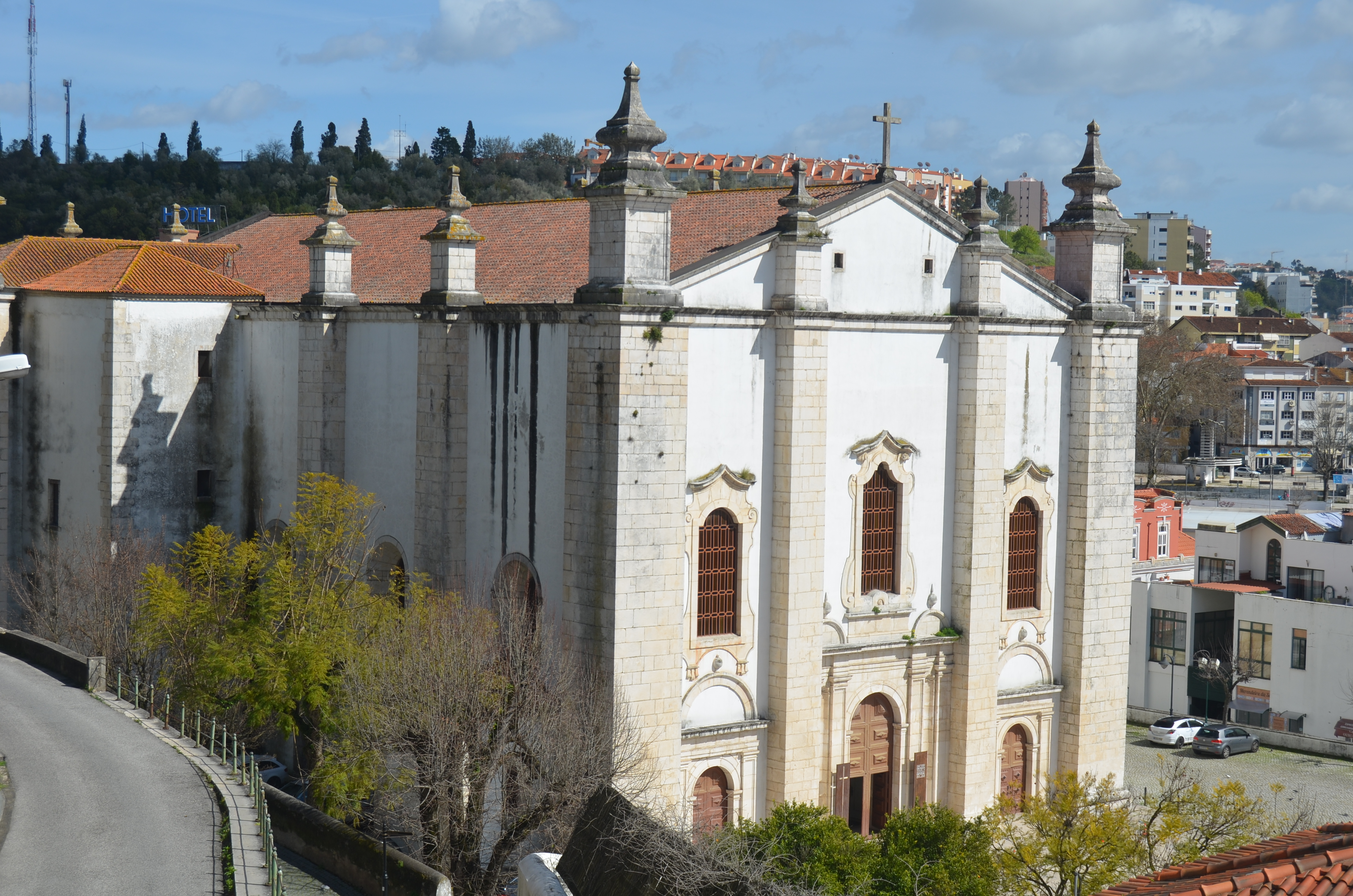 Sé de Leiria